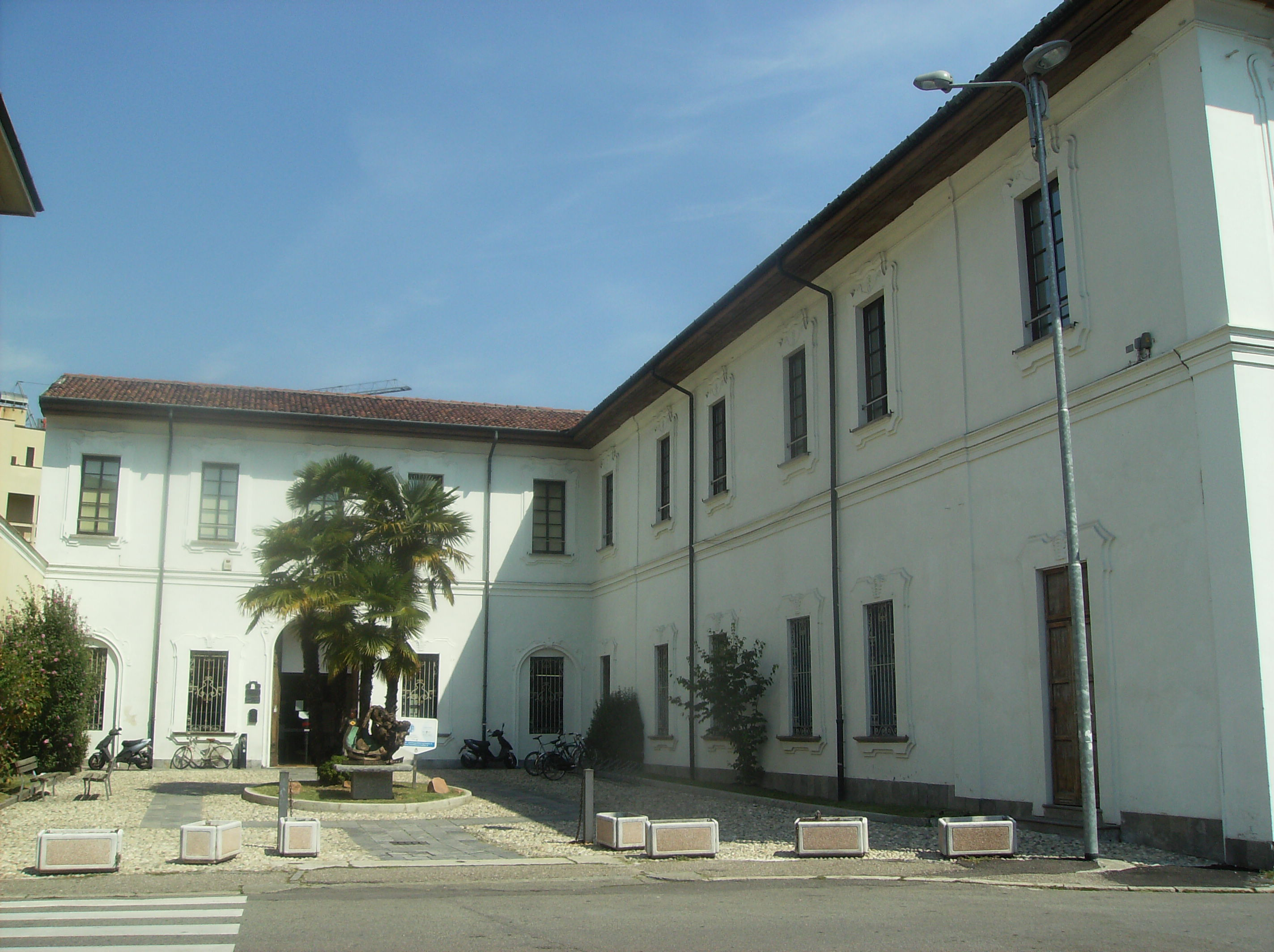 Palazzo Marliani-Cicogna - Busto Arsizio